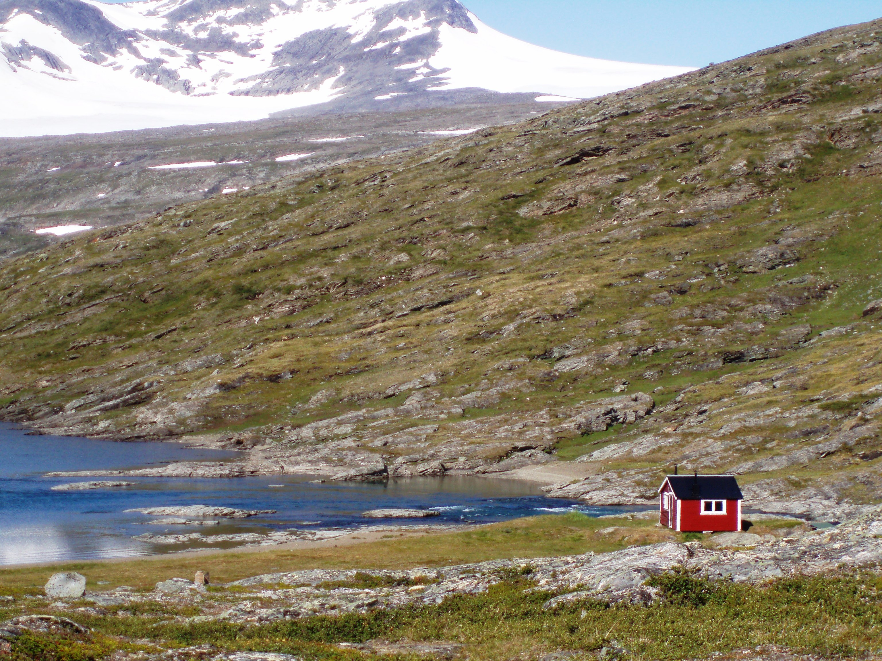 Konsul Perssons stuga (Sårgåsjaure fjällstuga) vid Sårgåsjávrre, Jokkmokks kommun, Sverige